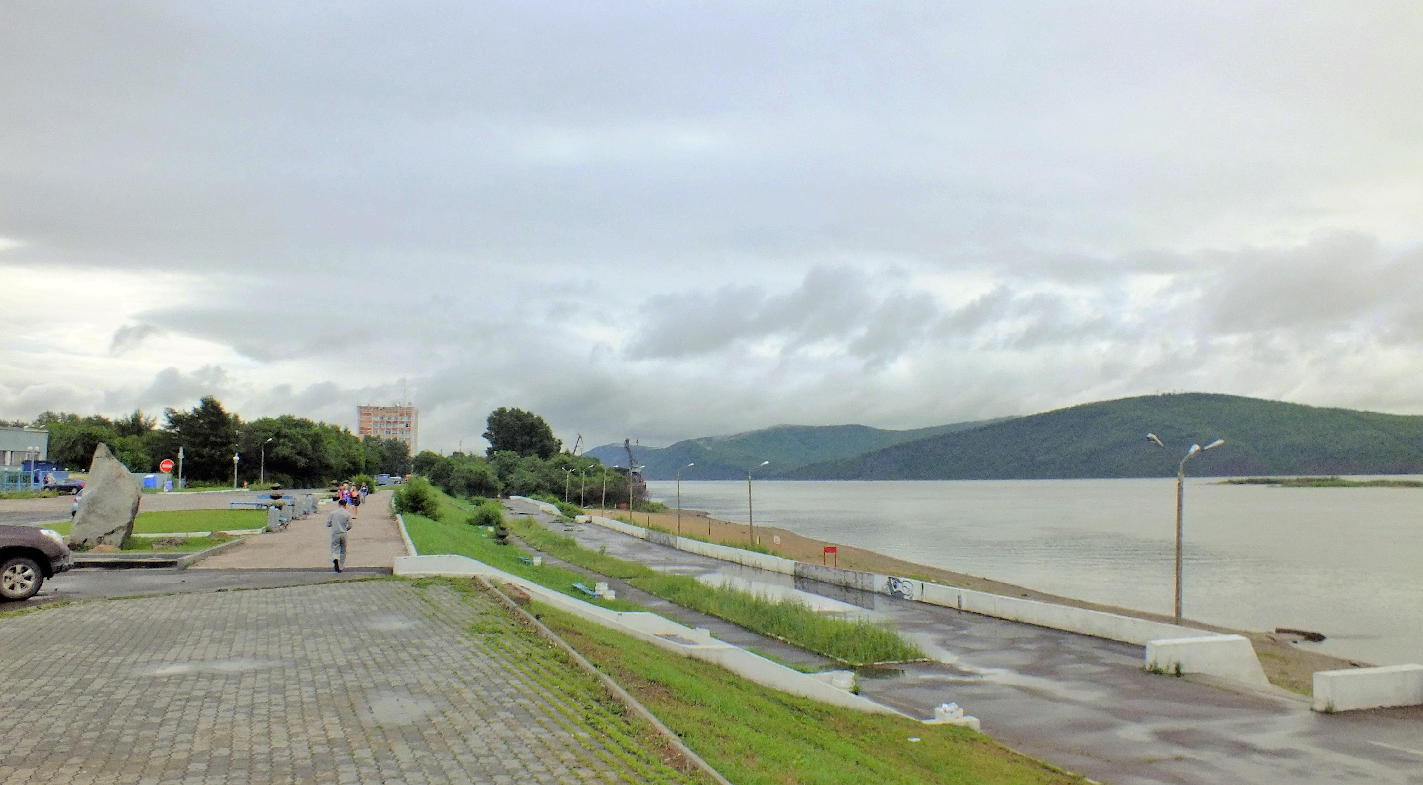 Амур в Комсомольске-на-Амуре